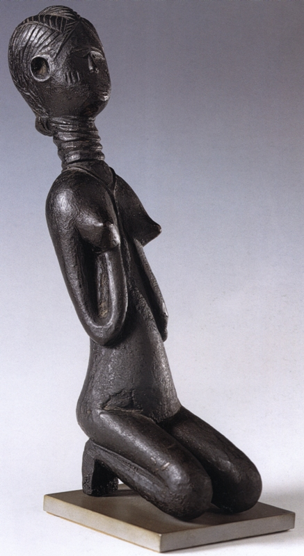 FIGURA FEMMINILE SO-NYANDE - Questa immagine esprime, attraverso diverse caratteristiche fisiche, alcuni segni che rimandano alla prosperità legata alla cultura materiale (il collo inanellato è segno di ricchezza), al mondo ordinato e civilizzato dell'agricoltura (le trecce dell'acconciatura rimandano alle linee dei campi coltivati), e al benessere fisico (la pelle nera lucida è segno di buona salute). Le braccia che sorreggono i seni sottolineano, invece, l'importanza del ruolo materno. La testa è proporzionata al corpo e le forme sono fluide, con la curva delle braccia a richiamare quella delle gambe. Se l'asse del corpo è spostato all'indietro, slanciando la figura verso l'alto, i blocchi squadrati dei piedi, che contrastano con tutto il resto, la mantengono solidamente ancorata al terreno. La scultura temne non sembra avere un centro stilistico chiaramente definito e ogni sculture sembra avere il suo proprio stile. Queste statue sono scolpite per l'associazione iniziatica femminile Bondo e sono portate in processione dalla donna di più alto rango (soko) in occasione della cerimonia in cui le ragazze, dopo essersi bagnate ritualmente nel fiume, vengono portate nel bosco sacro per essere escisse. Si ritiene infatti che l'asportazione del clitoride renda la donna "pulita" e ne accresca le capacità riproduttive, Questa figura incarna il modello di femminilità che l'apprendistato iniziatico deve realizzare: la bella (nyande) so (ko). La società bondo (o sande) è diffusa anche tra le popolazioni della regione, come i Gola, Mende, vai, Kpelle e Bassa. Il suo compito è quello di preparare le donne alla vita adulta. La società bondo svolge anche funzioni di tipo politico, alternandosi con l'associazione maschile poro alla guida della comunità, la prima governando per tre anni, la seconda per quattro.